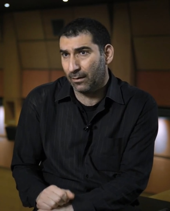 γιαννης οικονομιδης